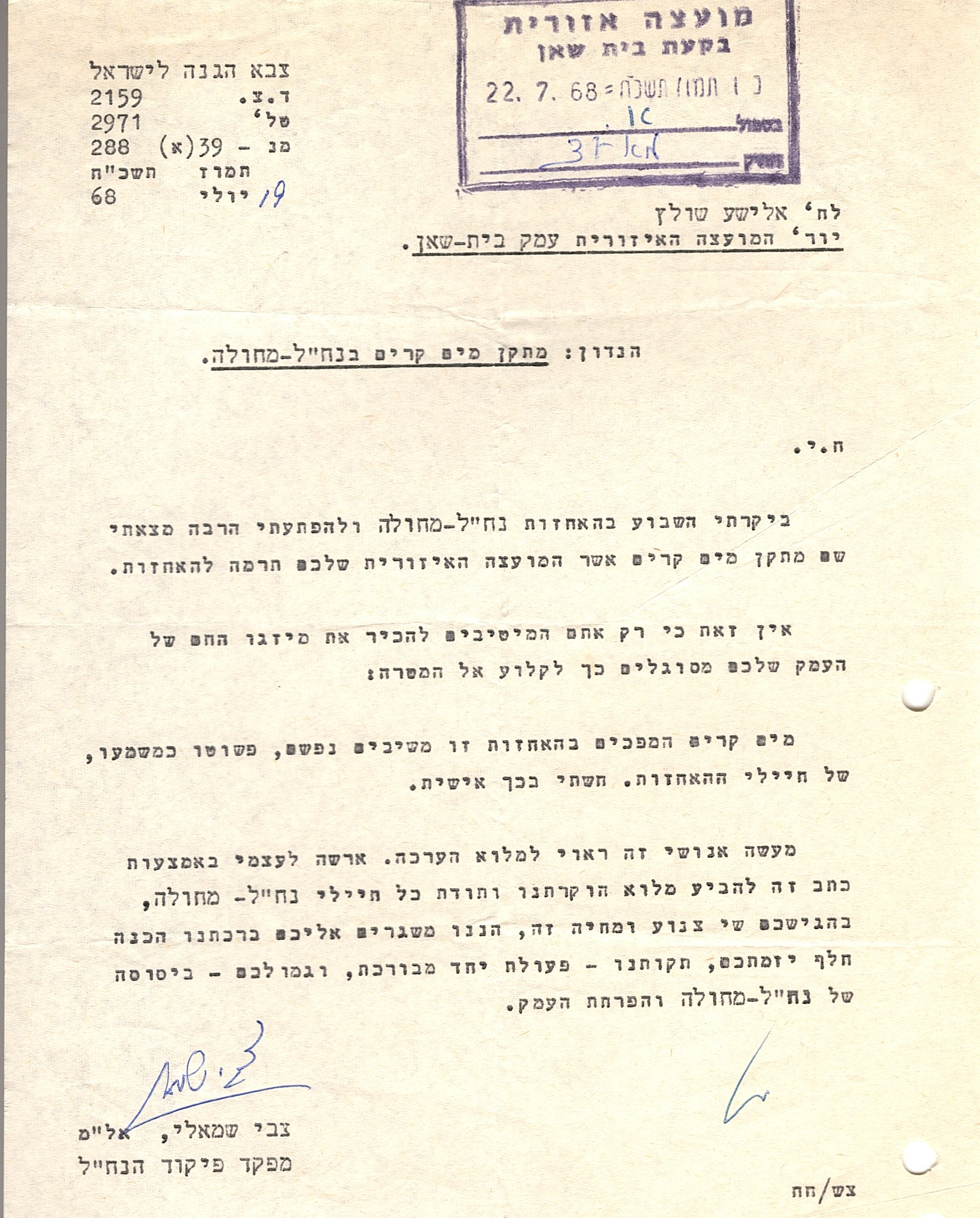 באדיבות ארכיון המועצה האזורית בקעת הירדן